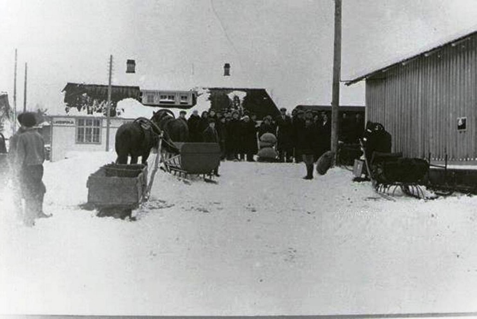 1930 год. Станция Лахденпохья